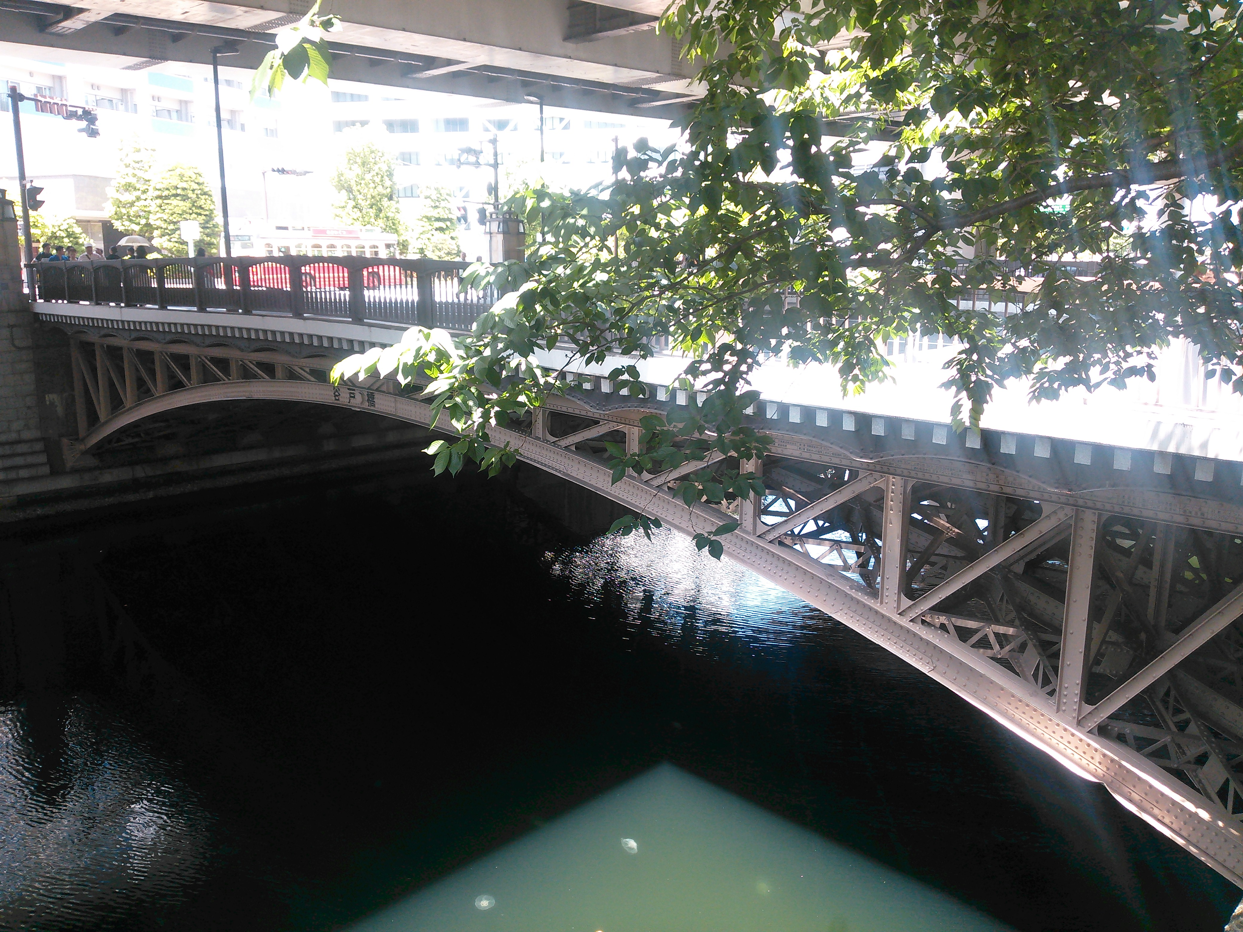 横浜市中区、山下町と元町の間に架かる谷戸橋